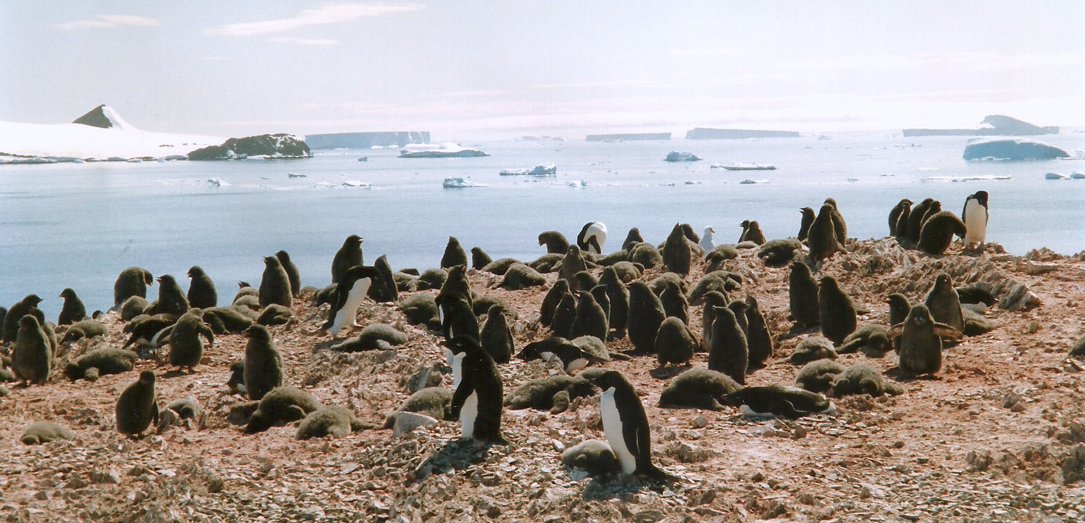 Hope Bay Argentinische Station Esperanza Antarkis